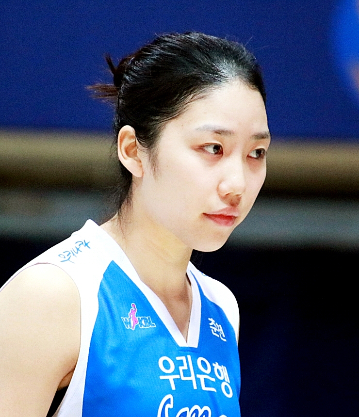 160101 여자농구 신한은행 vs 우리은행 직찍 2